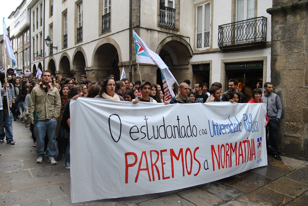 foto da normativa de permanencia